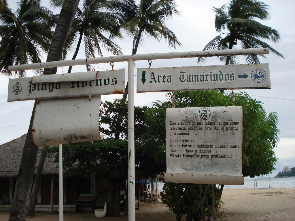 Letrero que señala los límites del Área Tamarindos en Playa Hornos (Acapulco, México)